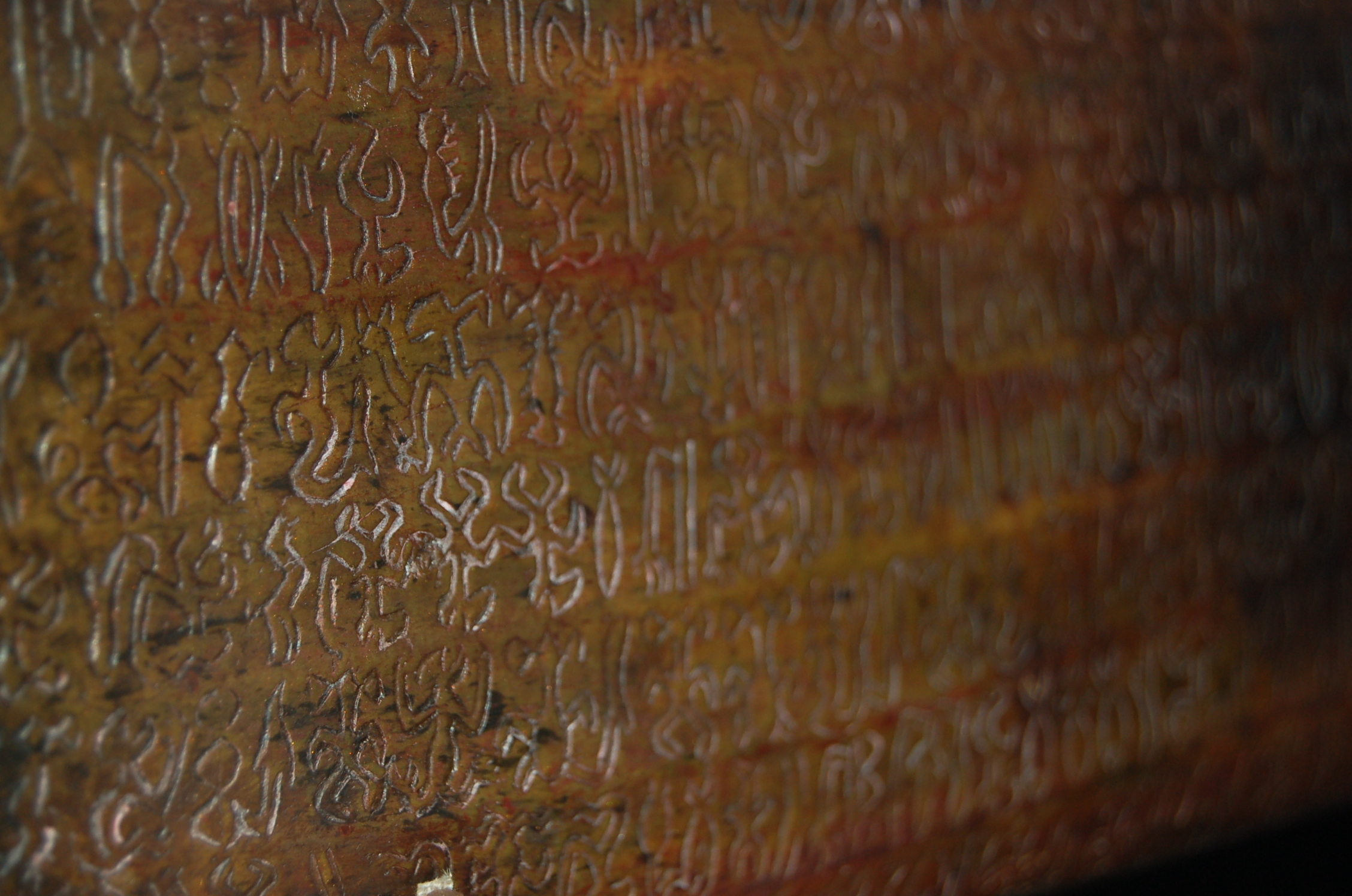 Rongorongo Schrift auf historischem Holz